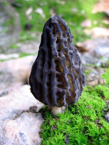 Morchella conica, morel , גמצוץ חרוטי